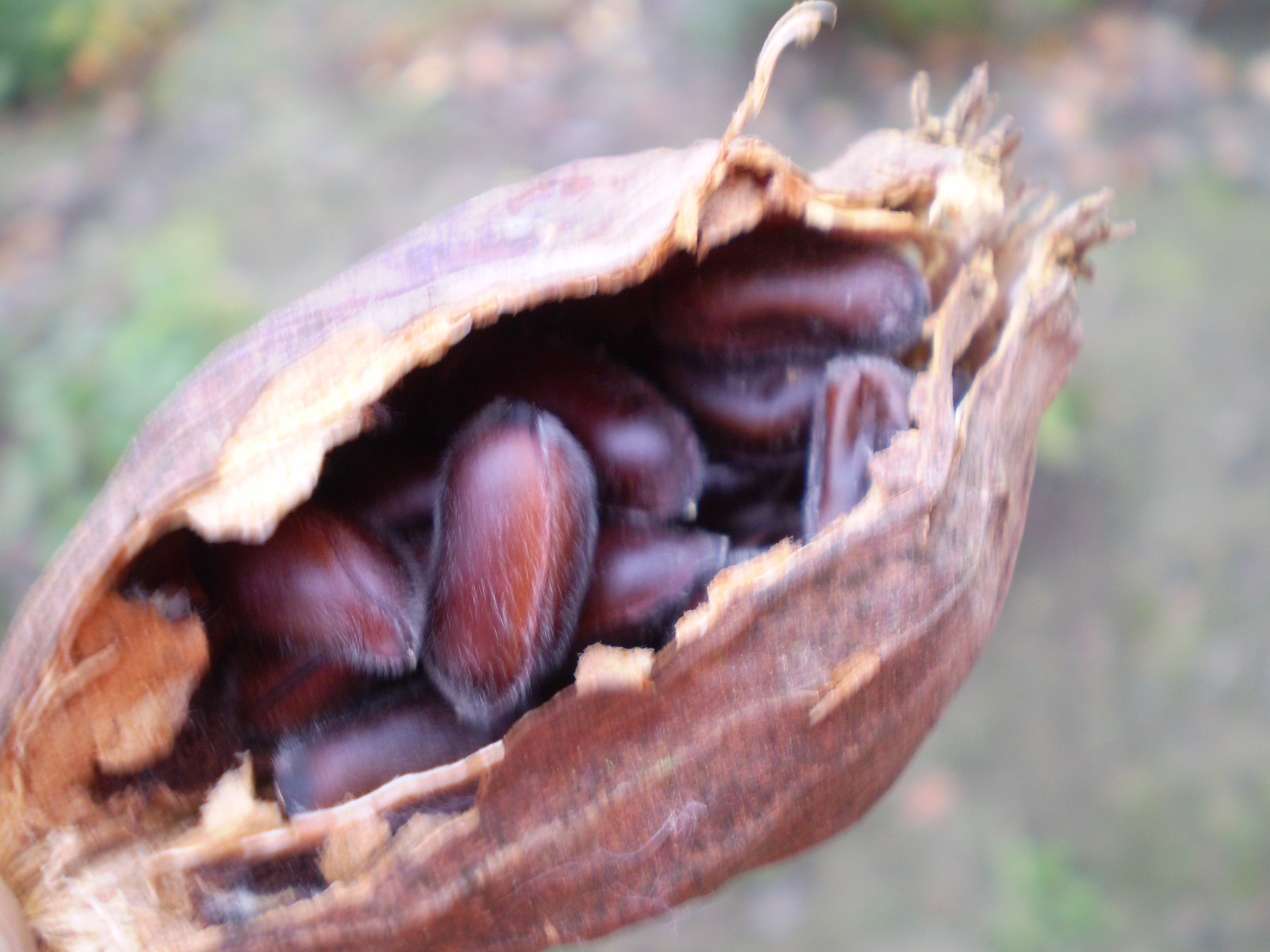 Calycanthus floridus meloenboompje/specerijstruikje